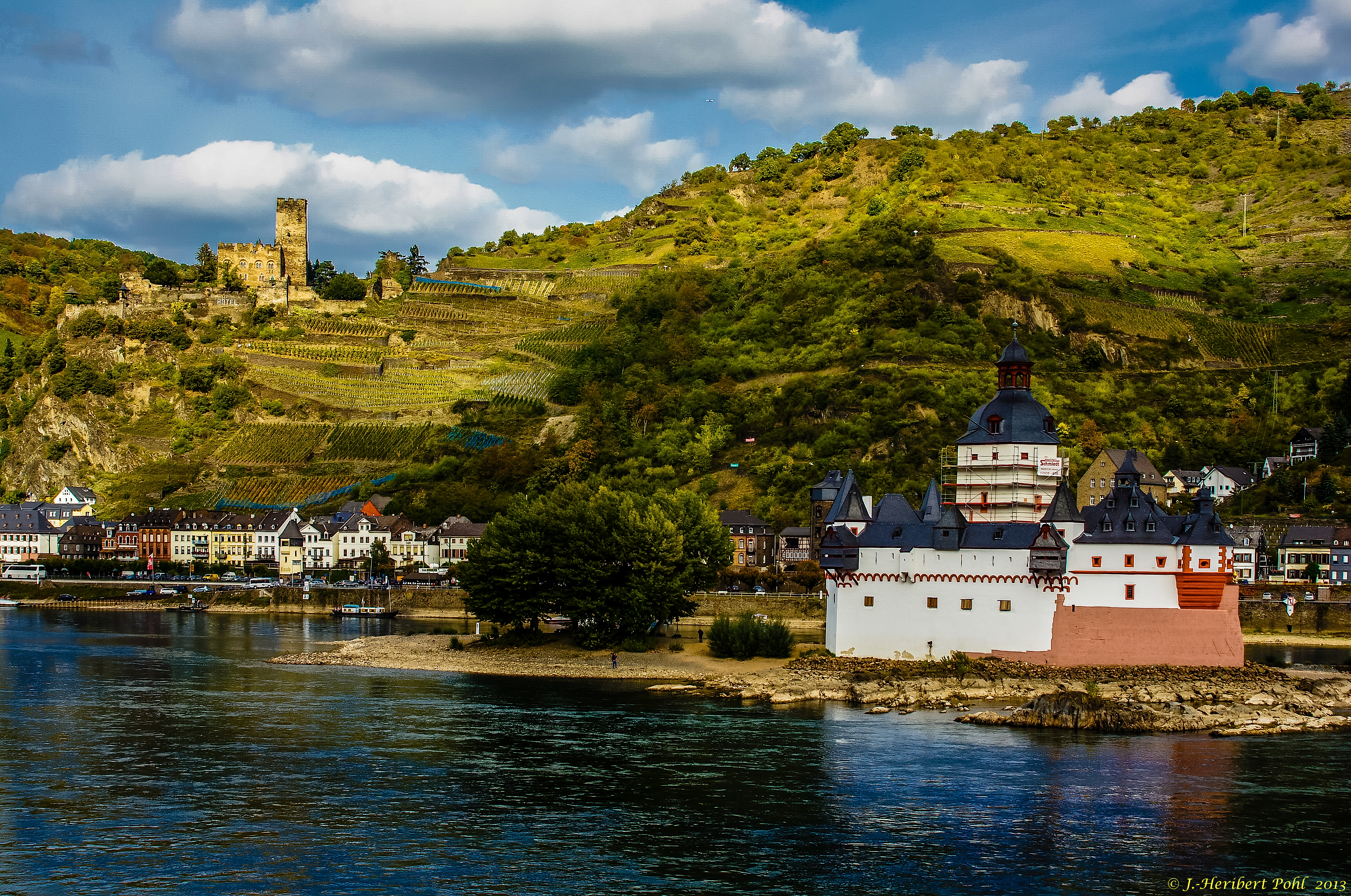 Burg Gutenfels Die Spornburg wurde ab 1220 als Reichsburg gebaut. 1289 wurde die Burg, die Ländereien und die Ortschaft Kaub an Pfalzgraf Ludwig verkauft. 1504 wurde die Burg nach langer erfolgloser Belagerung auf den Namen Gutenfels getauft. Der ursprüngliche Name war Burg Cube (Kaub). Im Jahre 1793 wurde sie kampflos an die Franzosen übergeben und Napoleon ließ sie 1806 sprengen. Im 19. JH wurde die Burg durch Friedrich Gustaf Habel wieder teilweise aufgebaut. Seit 2008 ist sie in Privatbesitz und wurde aufwendig renoviert. Burg Pfalzgrafenstein Die Anlage, eine Zollwachburg im Rhein wurde zwischen 1326 und 1327 von Ludwig dem Bayer errichtet. Sie diente nie als Wohnsitz einer adeligen Familie. Sie war ausschließlich dazu gebaut worden, Schiffe, die die Zollgrenze in Kaub überfuhren weiter zu melden. Ausserdem befand sich ein Verließ in der Burg. Südlich der Burg setzte der preußische Feldmarschall Blücher am 31.12.1813 mit 50000 Soldaten und 15000 Pferden über den Rhein über, um die fliehenden Truppen Napoleon Bonapartes zu verfolgen.